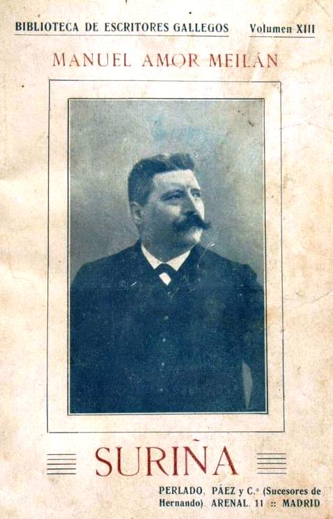 Suriña